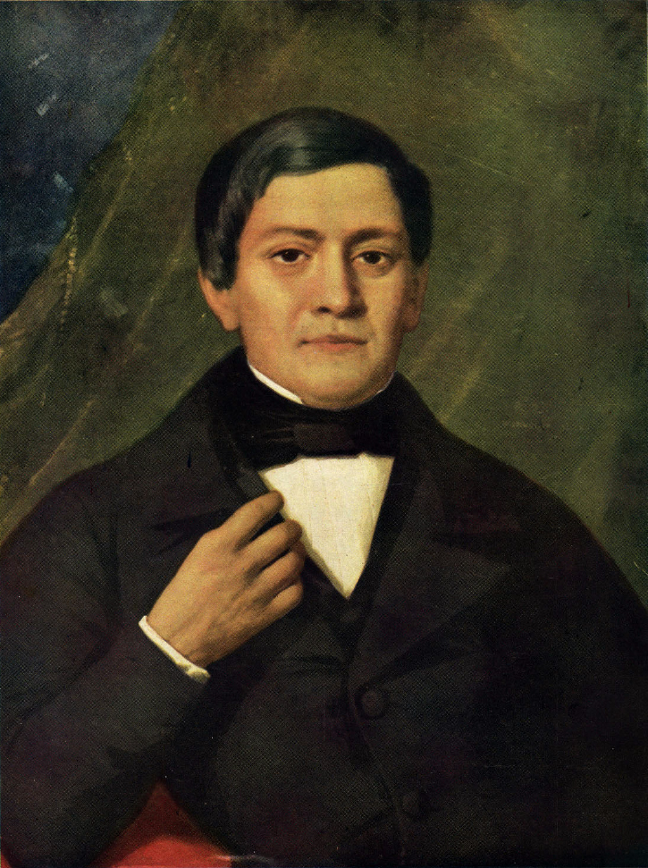 «Don Manuel Montt, a los 39 años de edad. Retrato del celebre pintor Monvoisin». Manuel Francisco Antonio Julián Montt Torres( * Petorca, Región de Valparaíso, Chile, 4 de septiembre de 1809 — † Santiago, Chile, 21 de septiembre de 1880) fue el Presidente de Chile entre 1851 y 1856, siendo reelegido inmediatamente por un segundo periodo entre 1856 y 1861. Perteneció a la emblemática familia Montt.